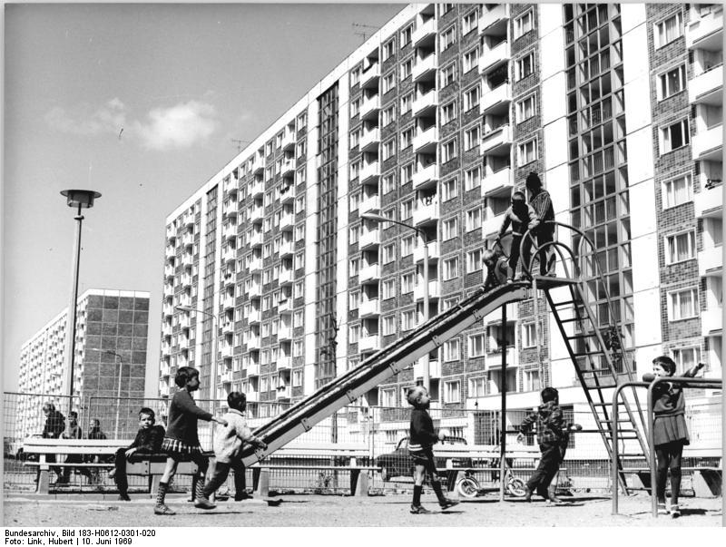 Rostock, Lütten Klein. Spielplatz Zentralbild Link 10.6.1969-Dr-Rostock - Tor zur Welt - Im neuerbauten Stadtteil Rostock-Lütten-Klein - Ein völlig neues Wohngebiet für ca. 50.000 Einwohner entstand in den letzten Jahren in Rostock-Lütten-Klein. Gleichzeitig wurden Schulen, Kindergärten, Einkaufszentren, soziale Einrichtungen und Spielplätze (unser Bild) eingerichtet.